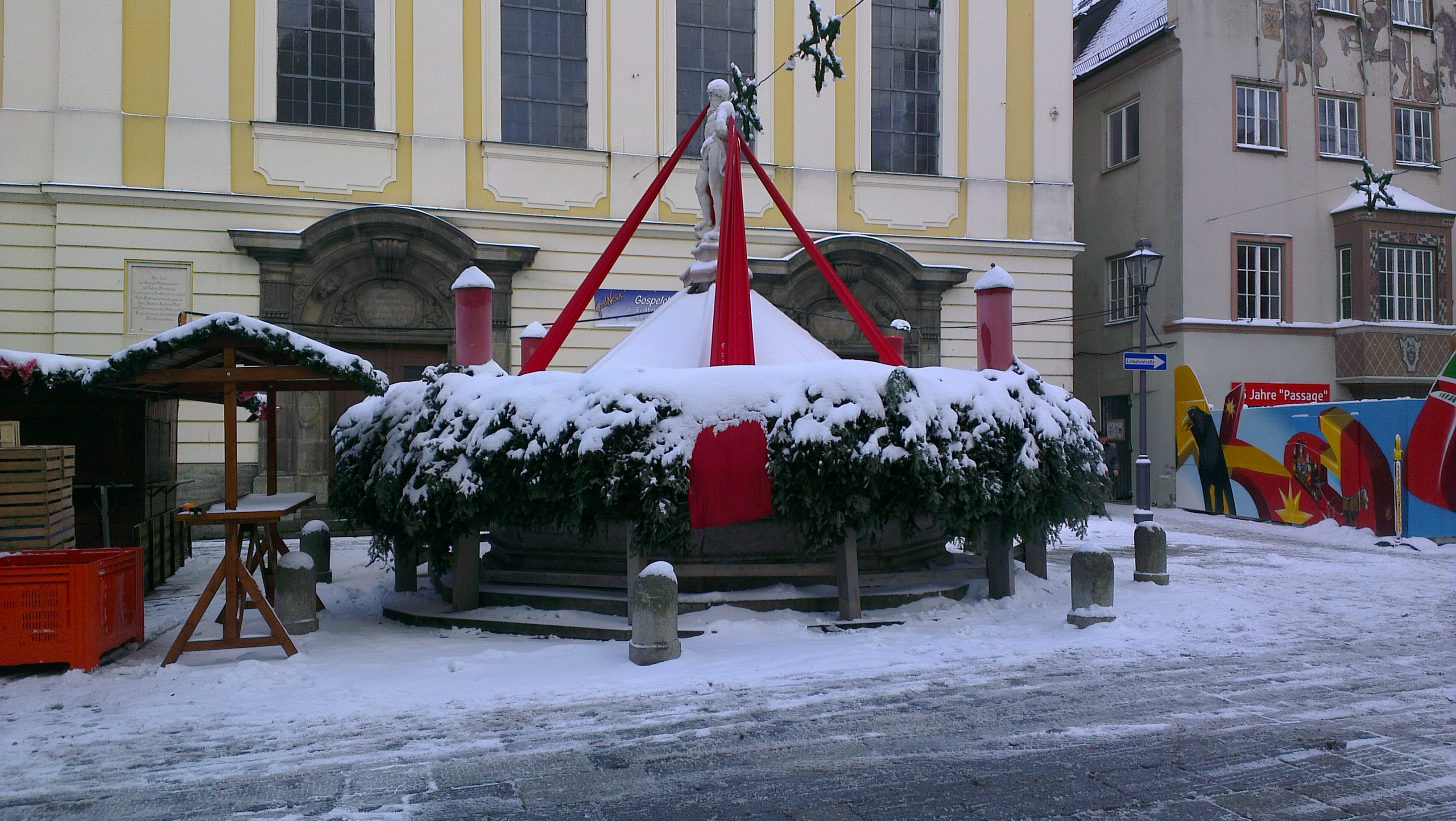 Kaufbeurens Neptunbrunnen trägt Adventskranz